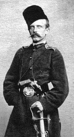 Тадеуш Єжи Стецький - волинський краєзнавець i письменник.